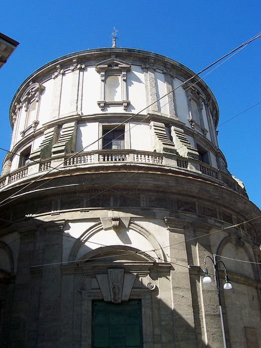 Milano - Chiesa di S. Sebastiano